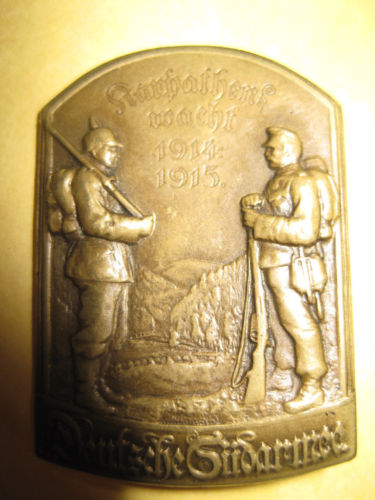 Kappenabzeichen "Karpatenwacht"